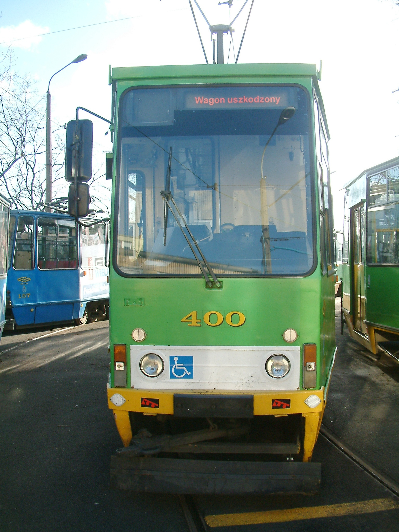 Konstal/HCP 105N/2 (115N) - front, Głogowska Depot, Poznań, Poland.